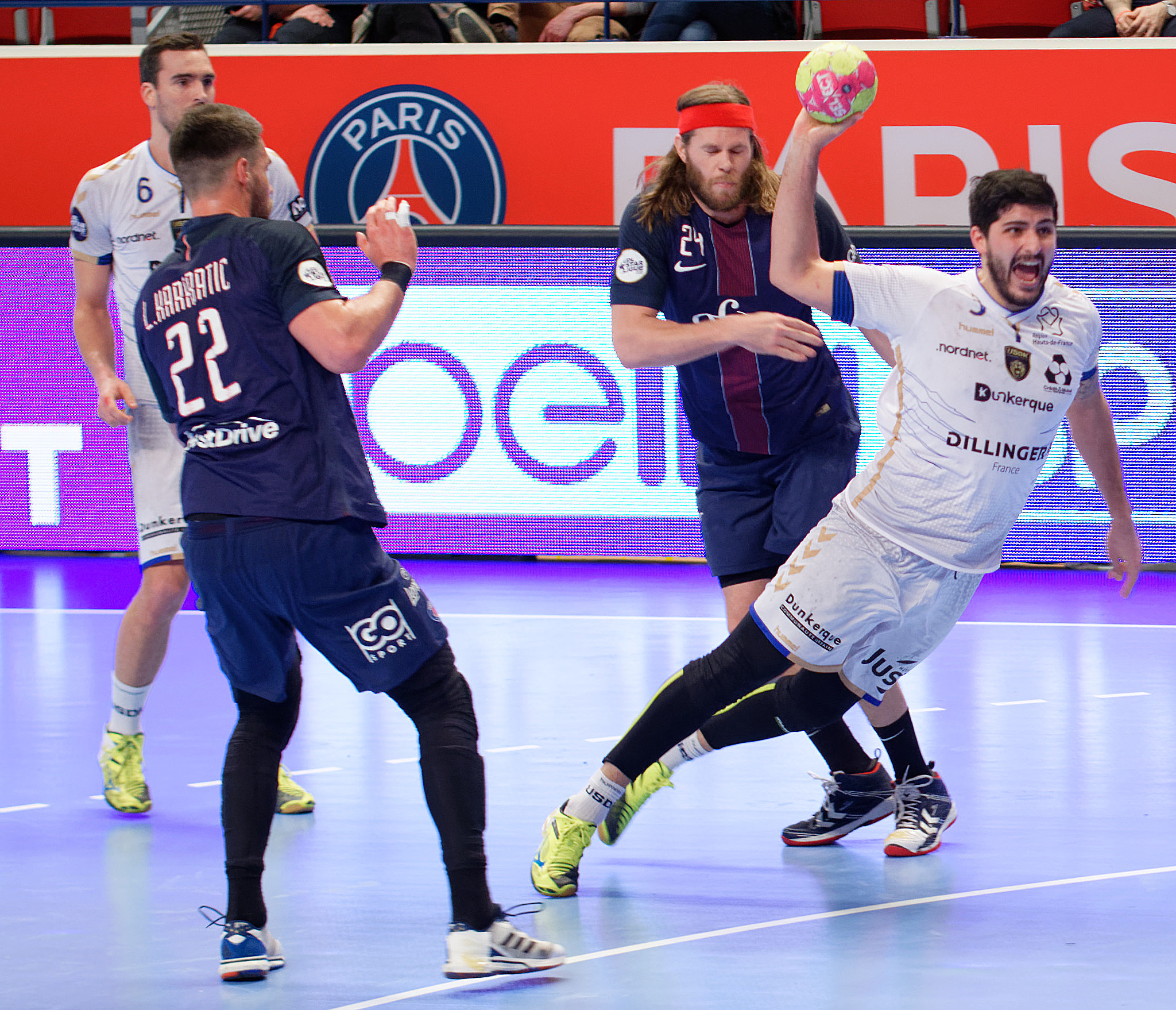 Rencontre de LidlStarligue entre le PSG et l'S Dunkerque. A Coubertin, le 08 mars 2017.